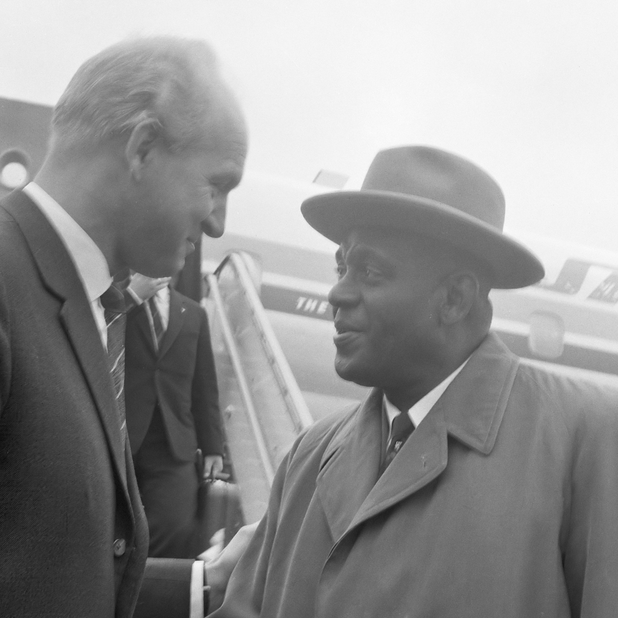 Aankomst Surinaamse Minister van Sociale Zaken en Volksgezondheid Ensberg op Schiphol. Minister Ensberg ( en W. van Zijl (l.) 5 april 1961